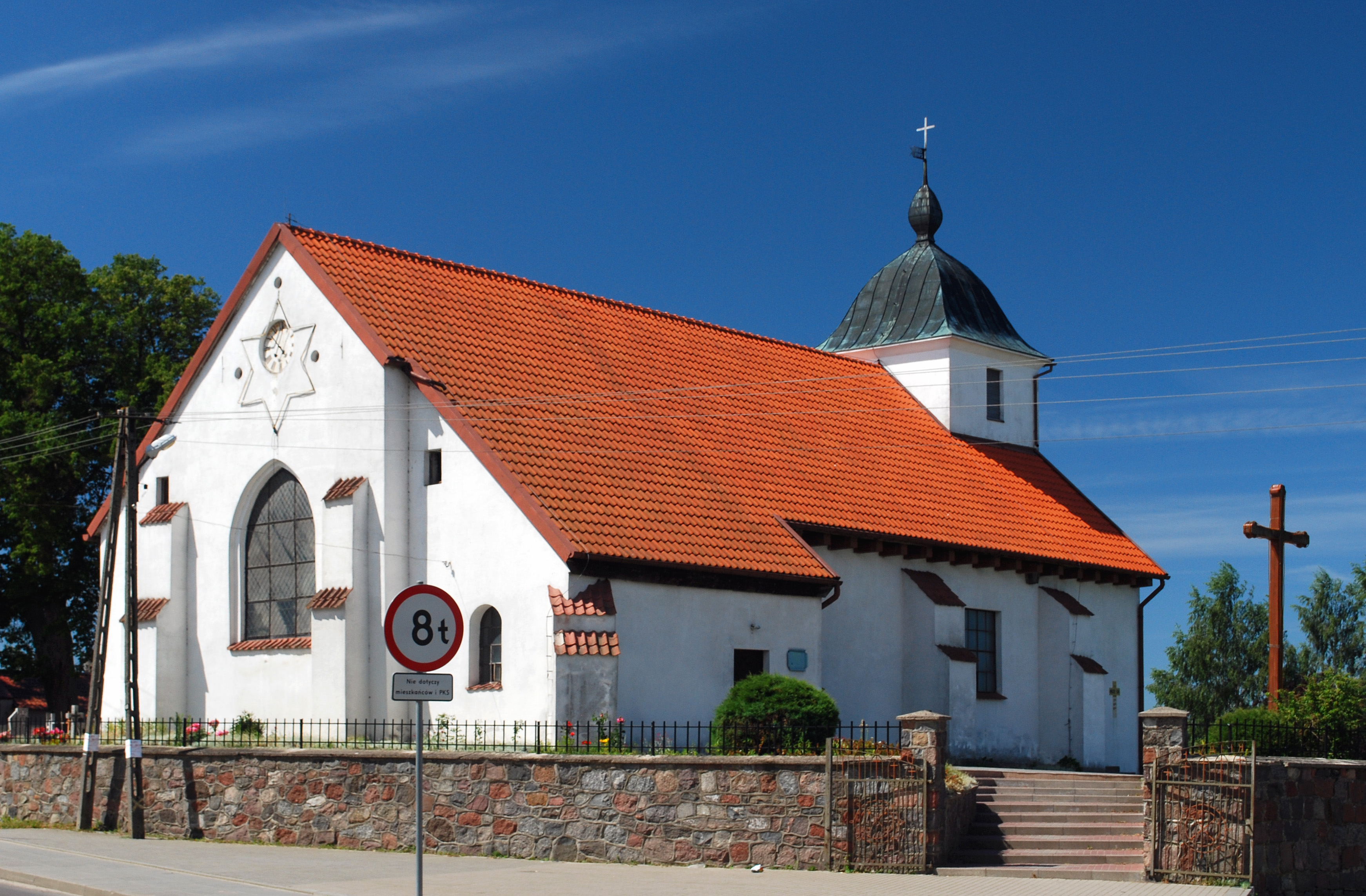 Kościół w Przyjaźni, woj. pomorskie.